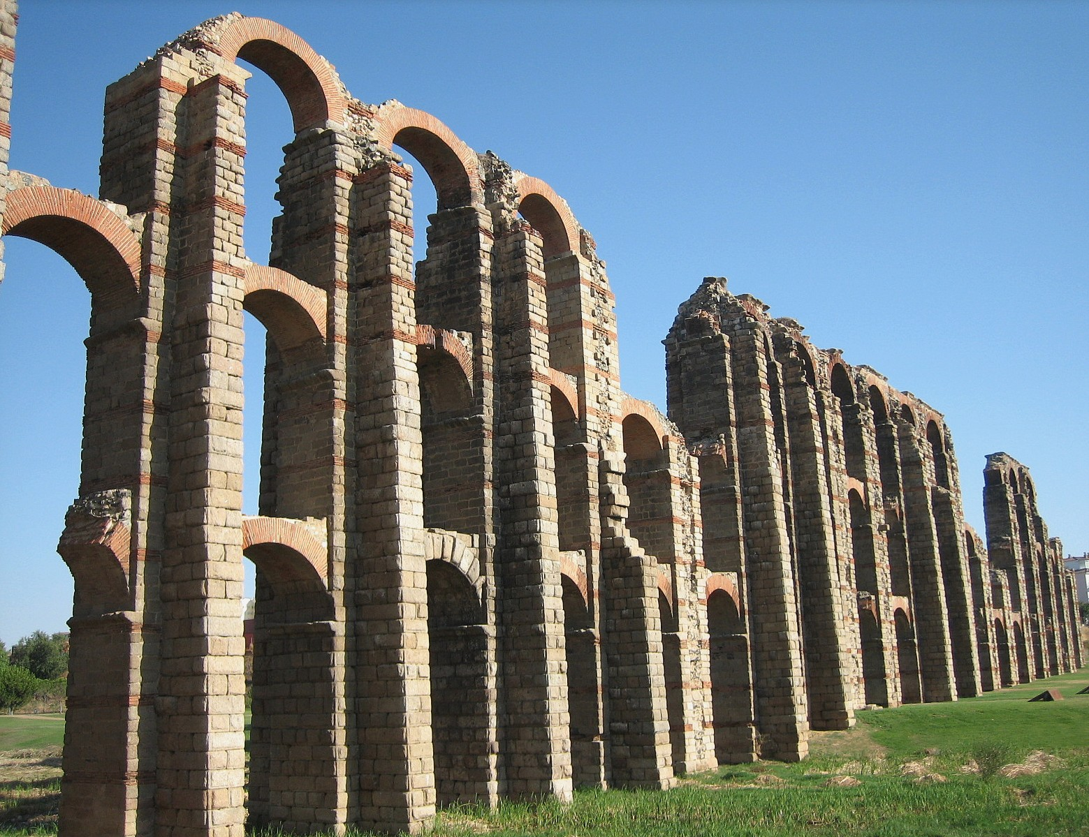 Aqueduc qui transportait l'eau depuis le barrage de Proserpina situé à 5 kms de Merida.